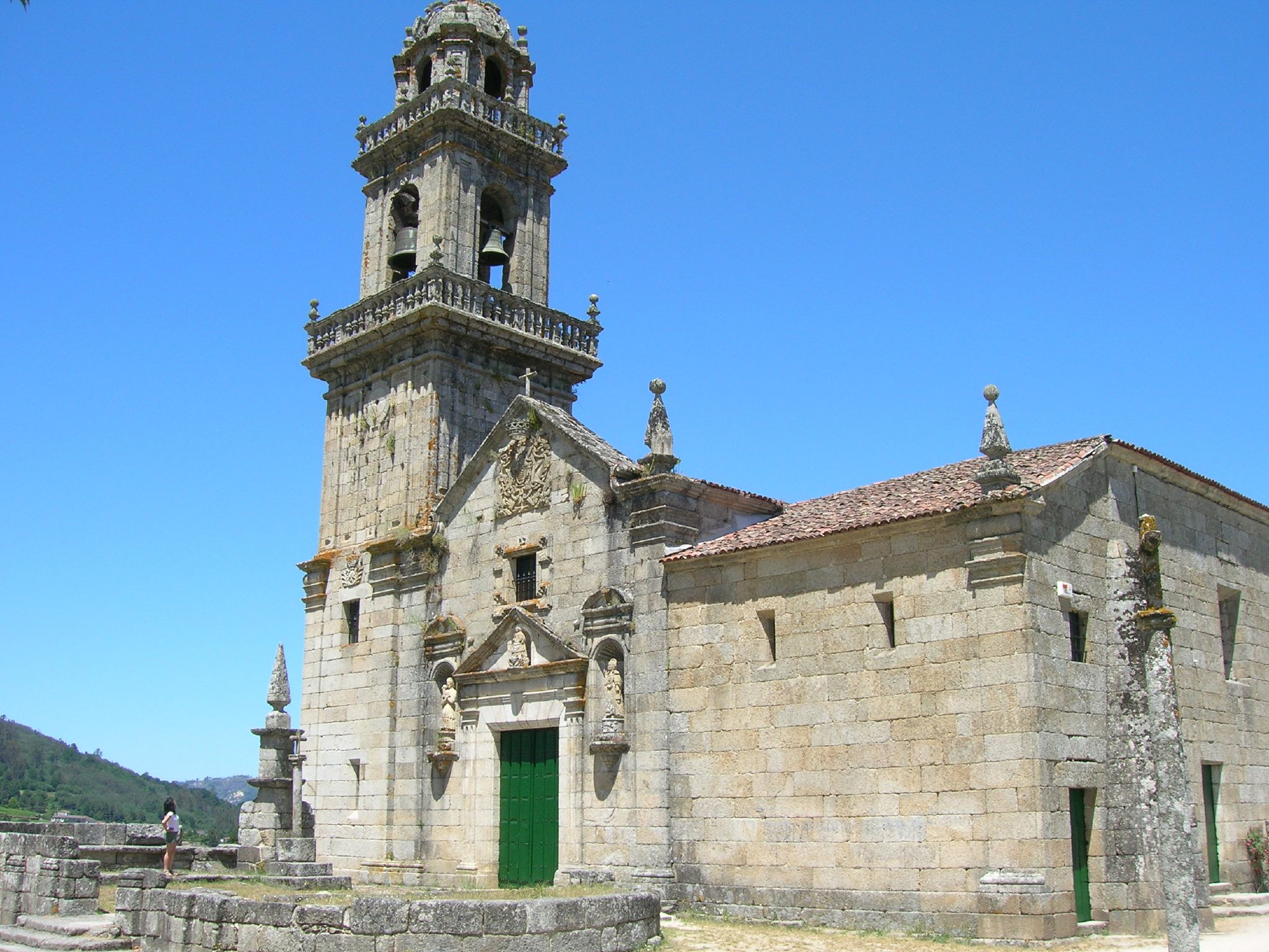 La iglesia parroquial de Santa María de Beade contiene restos arquitectónicos que van desde el románico hasta nuestra época.